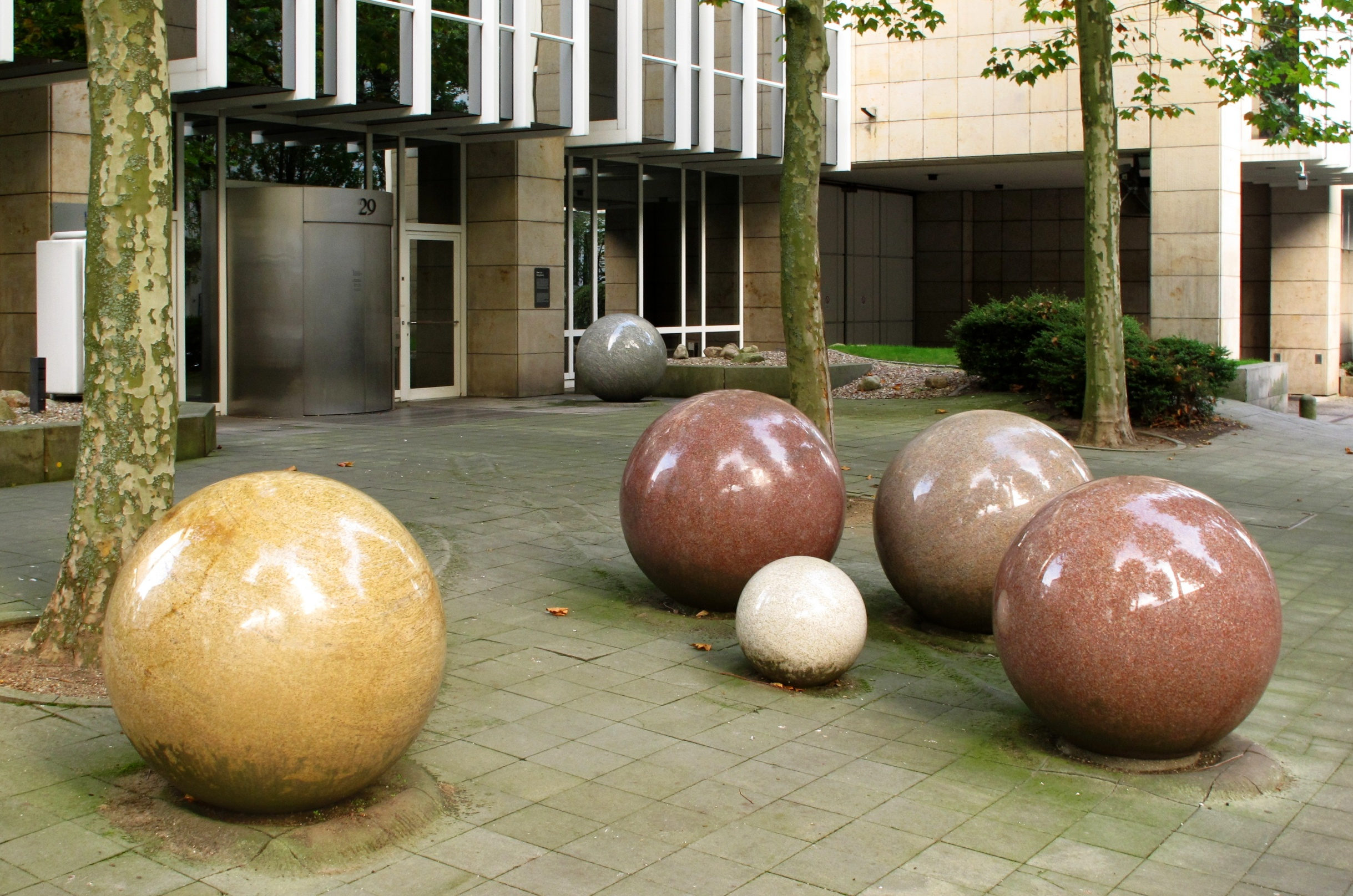 Bernd Uiberall: Boule-Spiel (1983); Granit, Sandstein; Bremen (Deutschland)